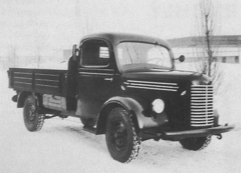 Lehký nákladní automobil Škoda 100.